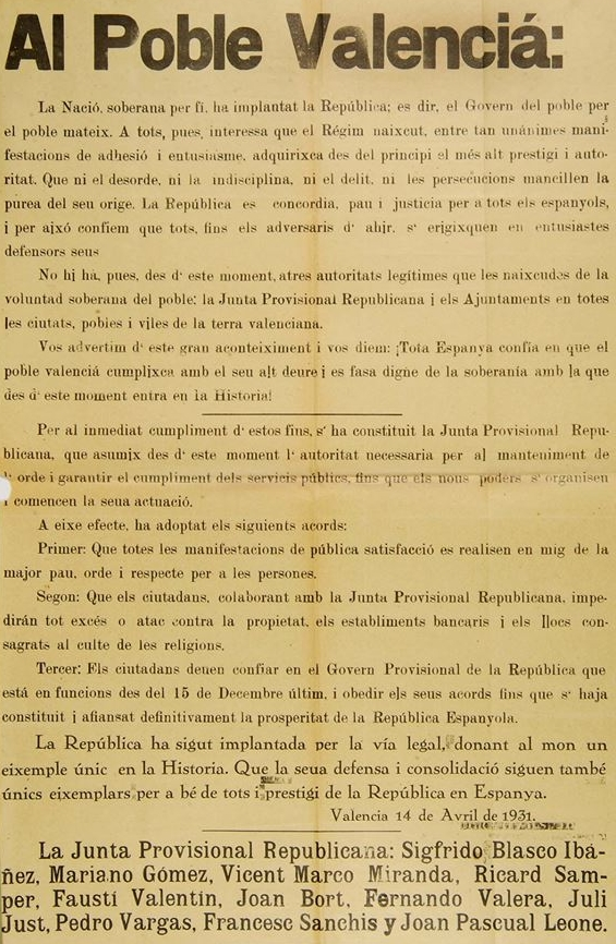 Text de la proclamació de la Segona República a València